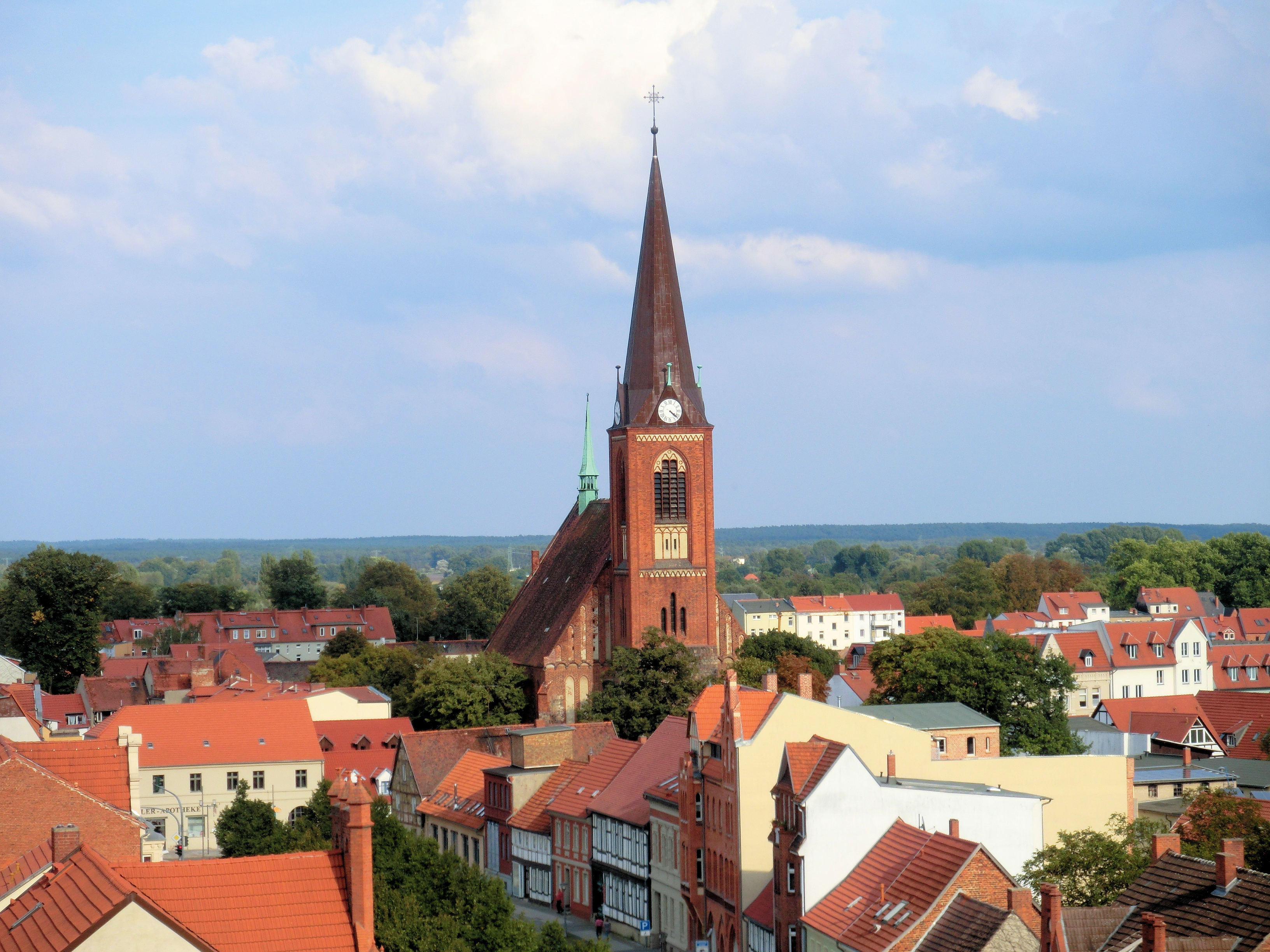 Stendal Jakobikirche